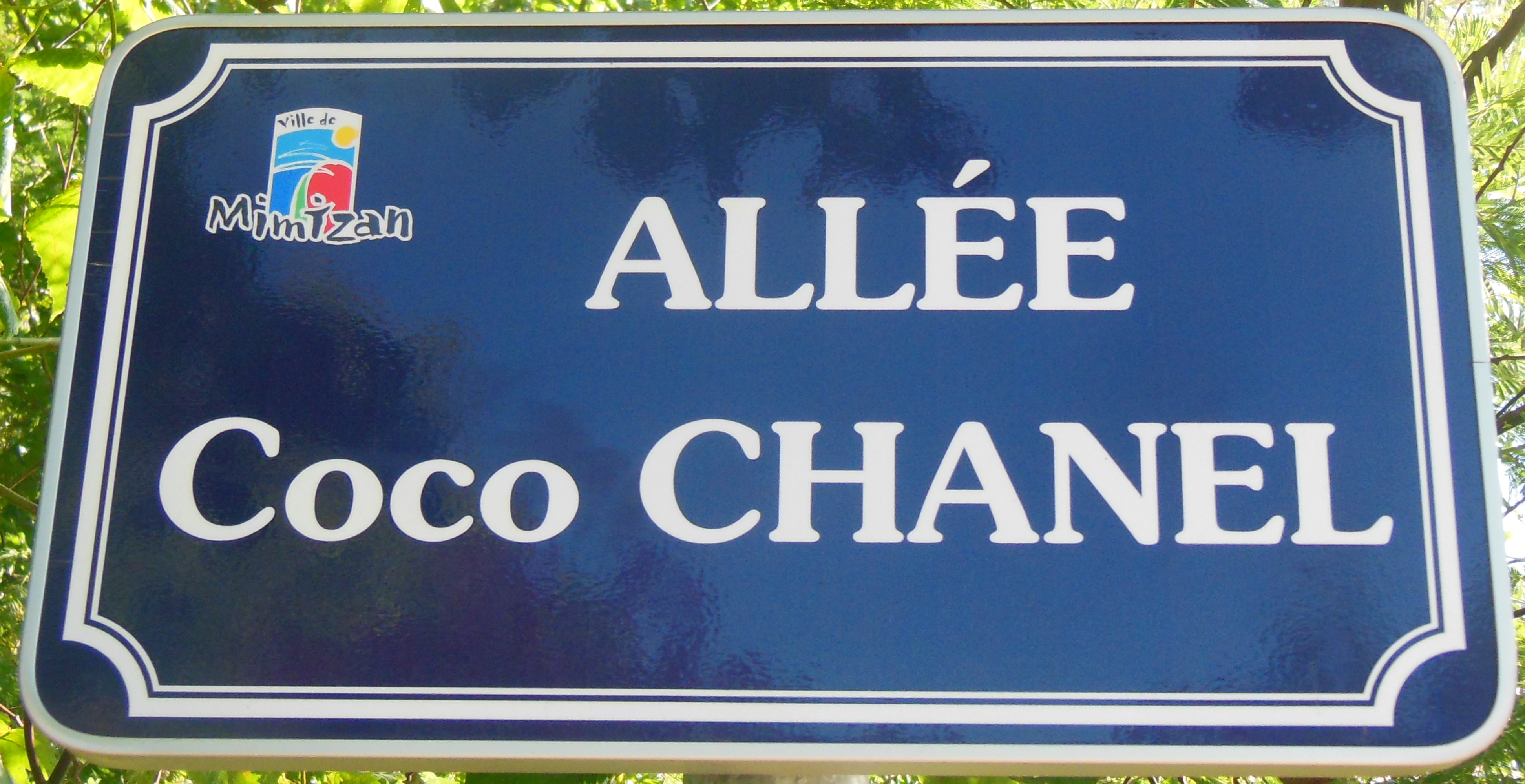 Panneau de rue à proximité du château Woolsack à Mimizan (Landes, France).